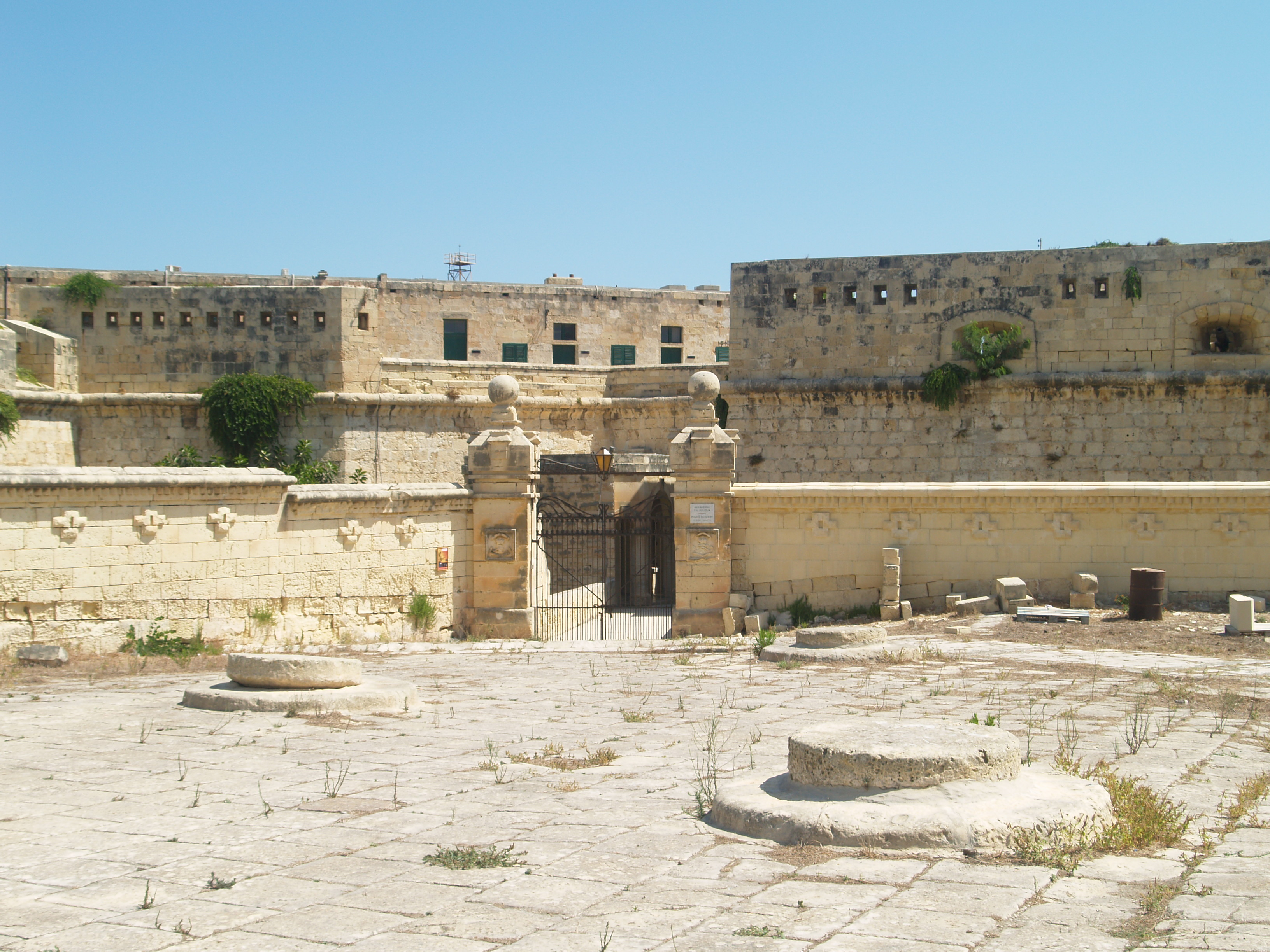 Fort St. Elmo, Valletta